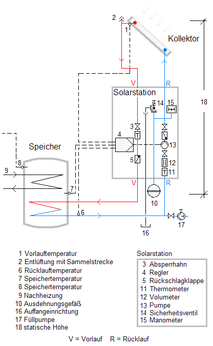 Solarkeis